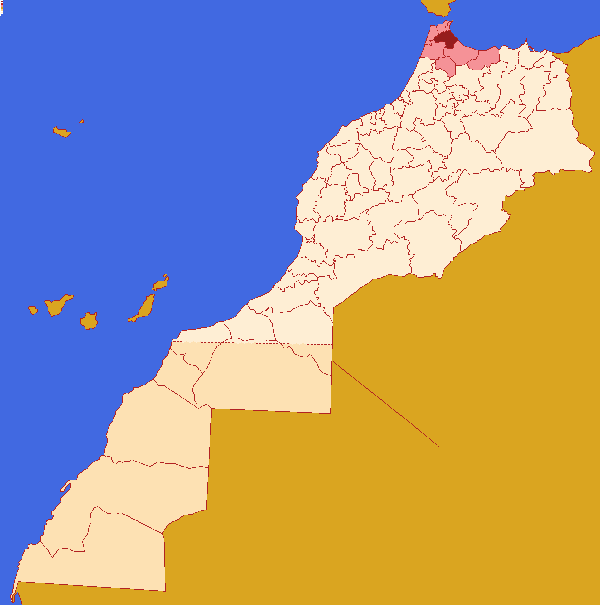 Localização da província de Tetuão dentro da região de Tânger-Tetuão-Al Hoceïma e dentro de Marrocos. Conforme a reforma administrativa de 2015.